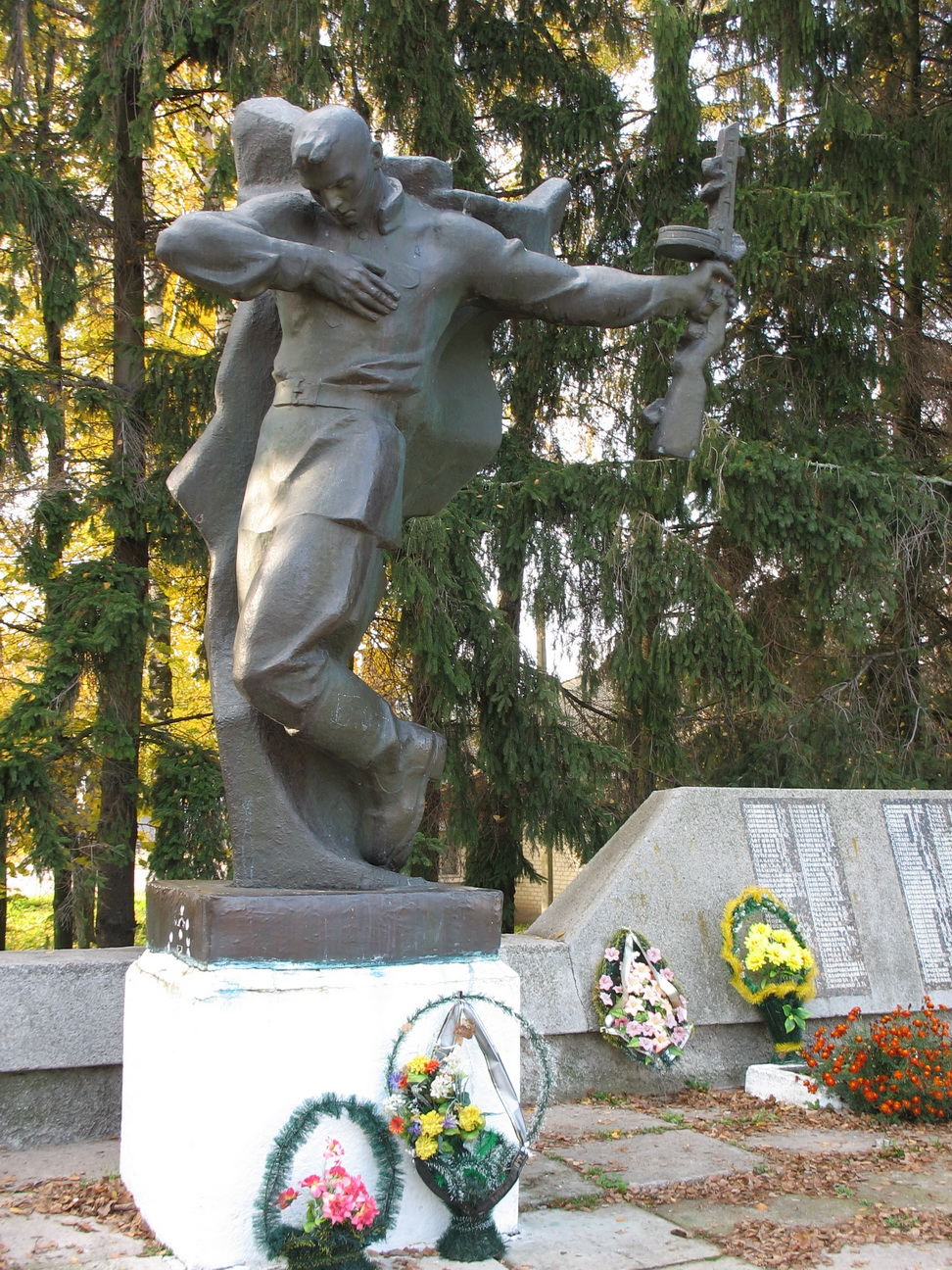 Україна, Чернігівська обл., Менський р-н, с. Киселівка. Меморіал воїнам-визволителям у Другій світовій війні